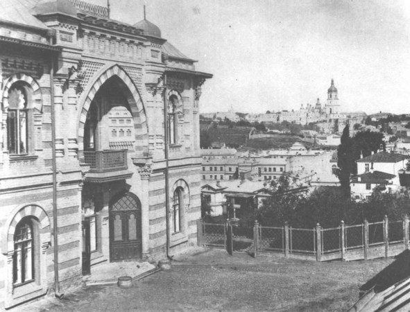 Особняк военного инженера М. П. Фабрициуса в псевдомавританском стиле.